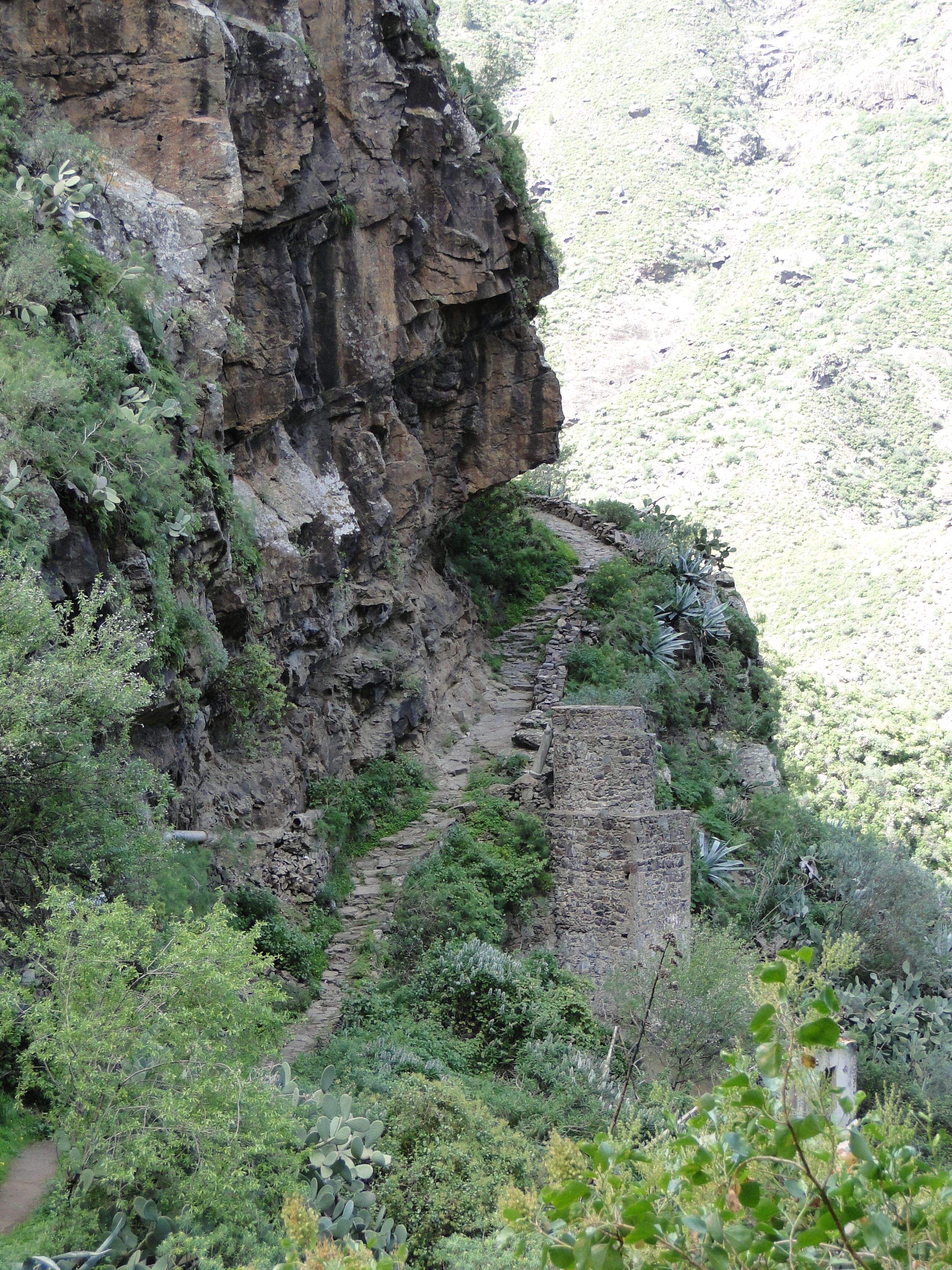 Agaete, Las Palmas, Spain